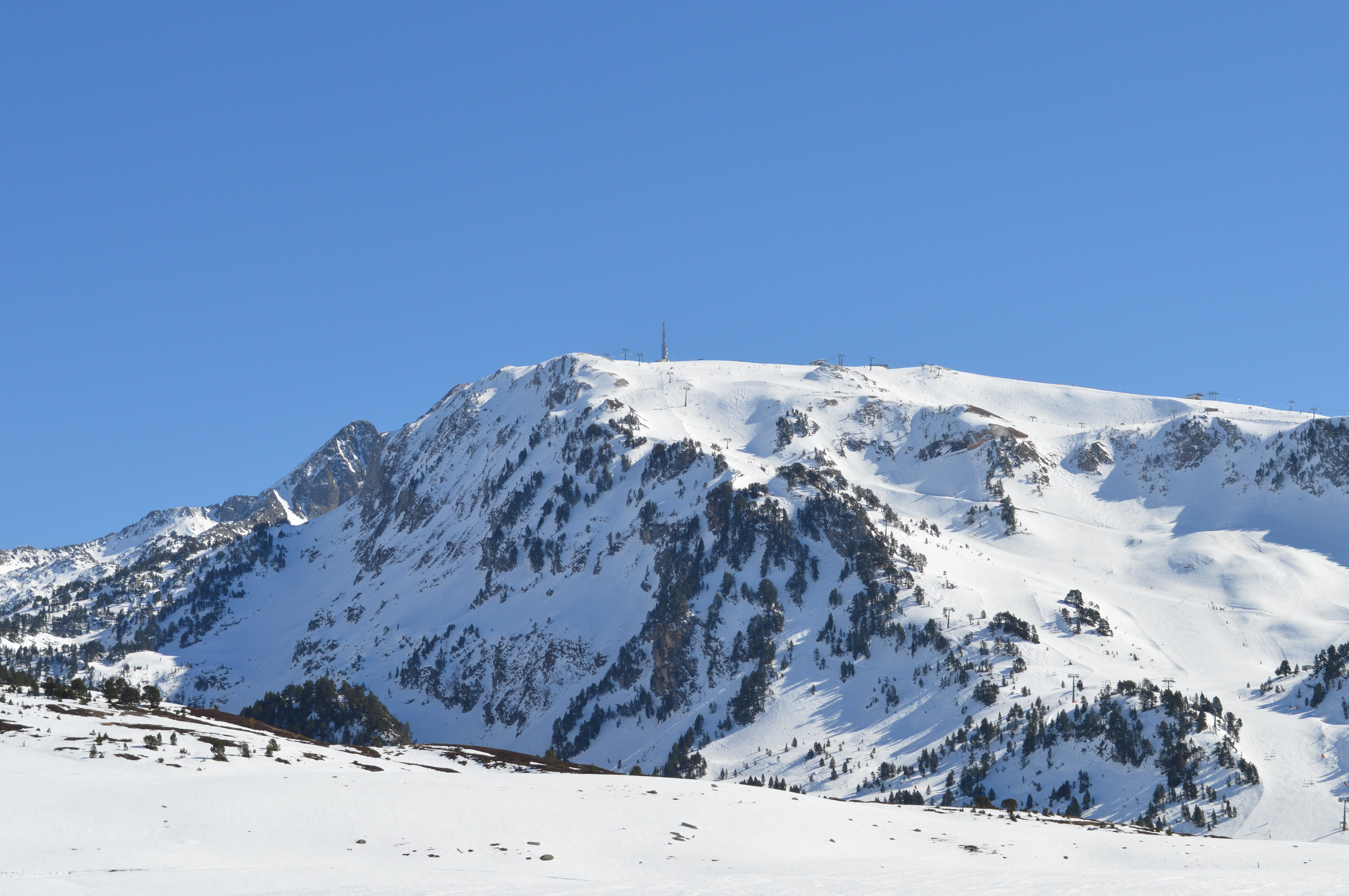 Cap de Vaquèira